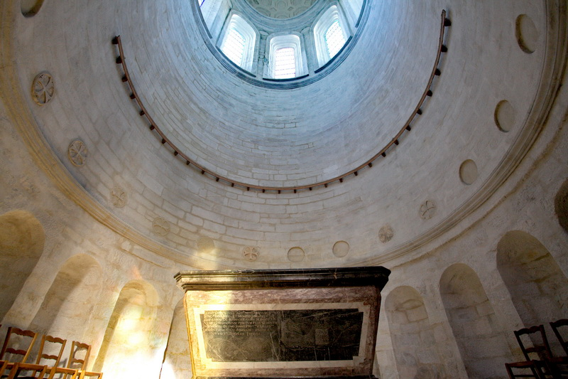 Tombeau de Saint Vicente Ferrer a la Cathédrale Saint-Pierre (classé) .